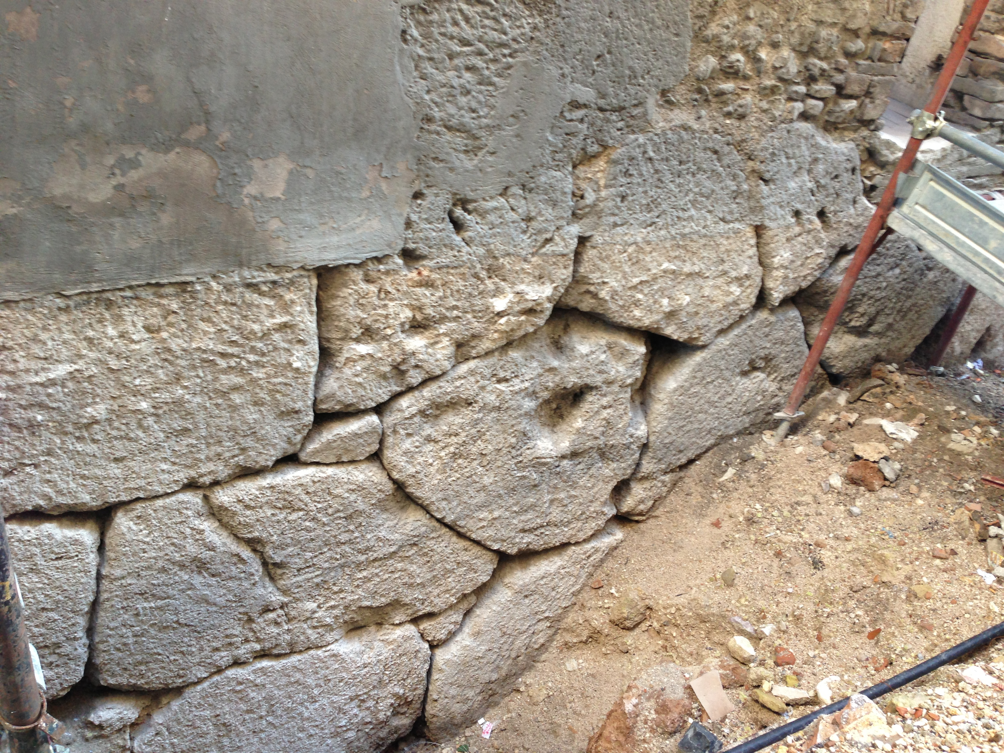 Mura urbiche di Spoleto epoca IV secolo a.C. rinvenute nel 2012